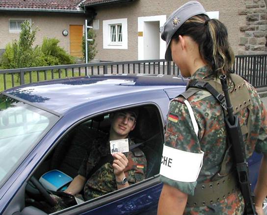 Wachsoldat (weiblich), Torposten